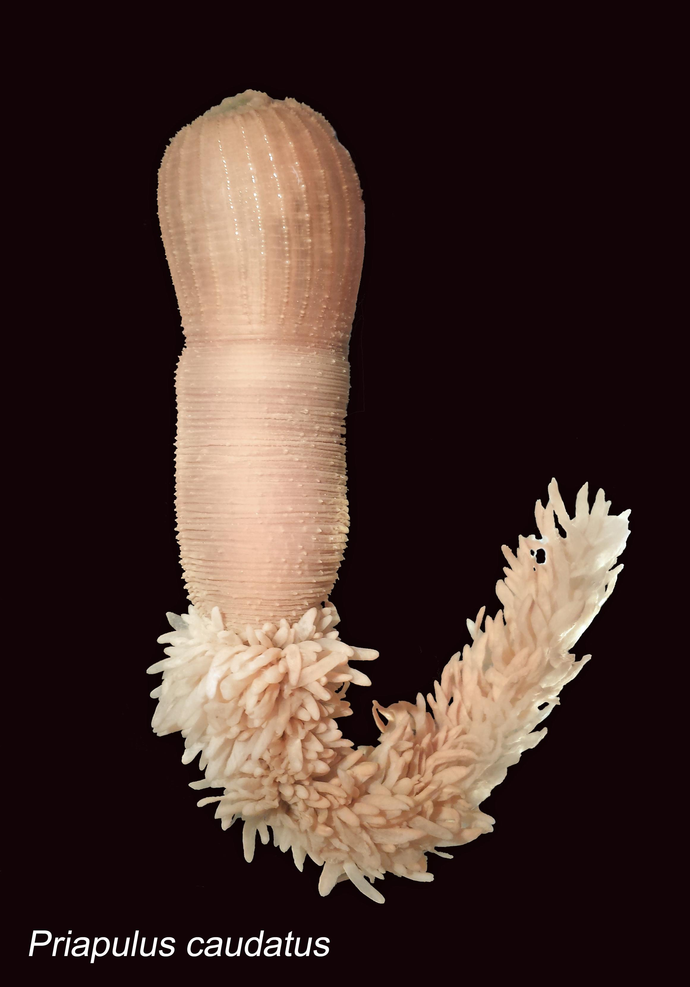 Priapulus caudatus (Lamarck 1816)